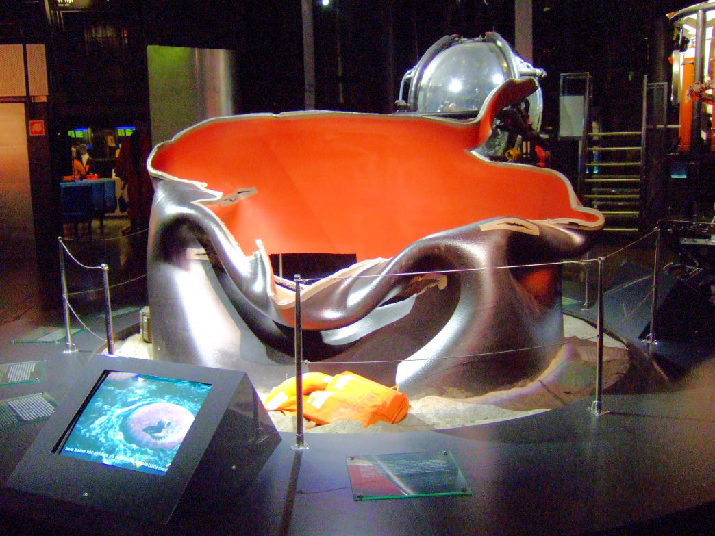 Del av staget som brakk under Kielland-ulykken